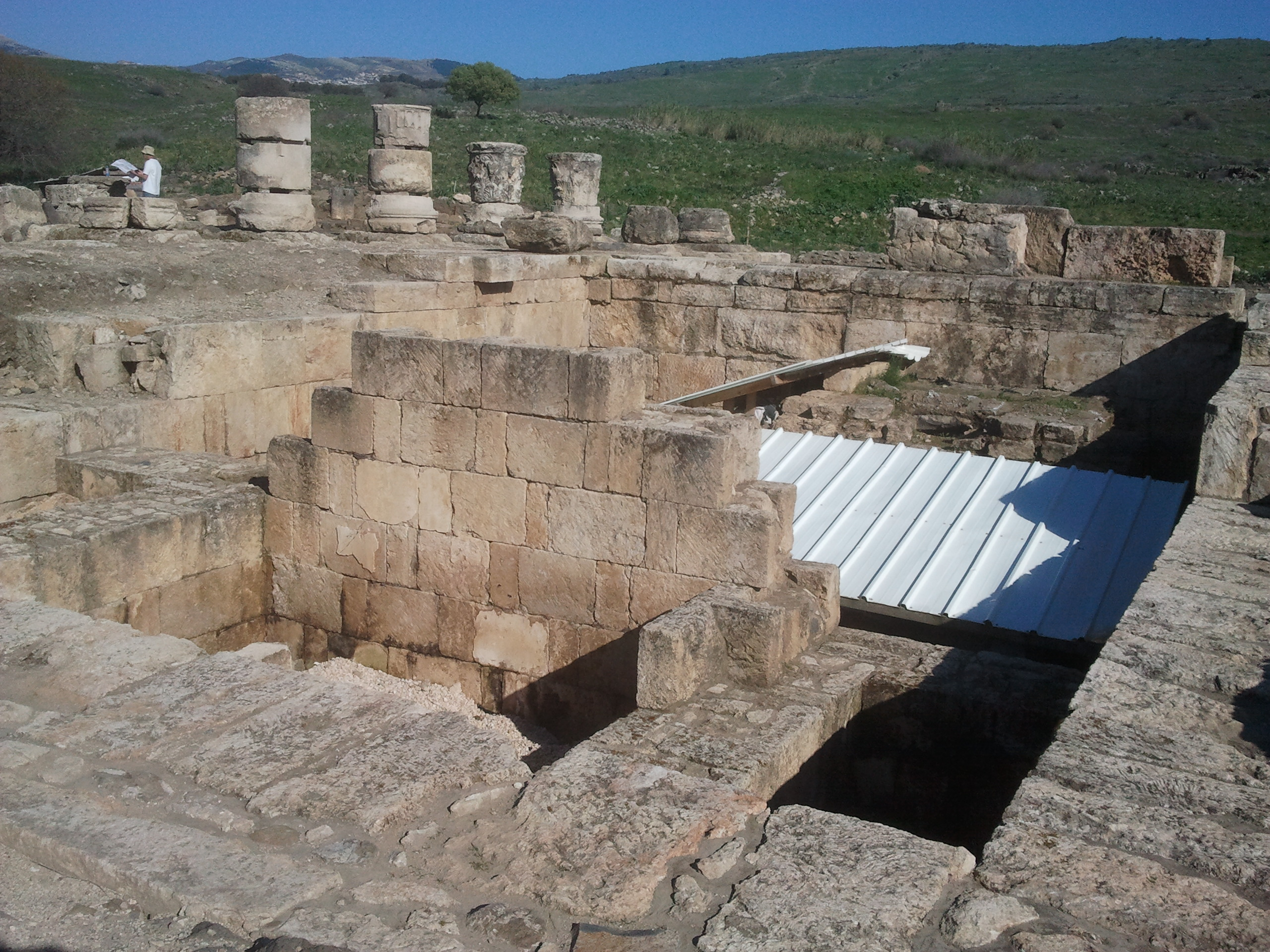 חורבת עומרית הוא אתר ארכאולוגי שבו שרידי מקדש רומי שבנה הורדוס לכבודו של המלך אוגוסטוס בבניאס. האתר שוכן למרגלות הגולן, ליד היישוב שאר ישוב